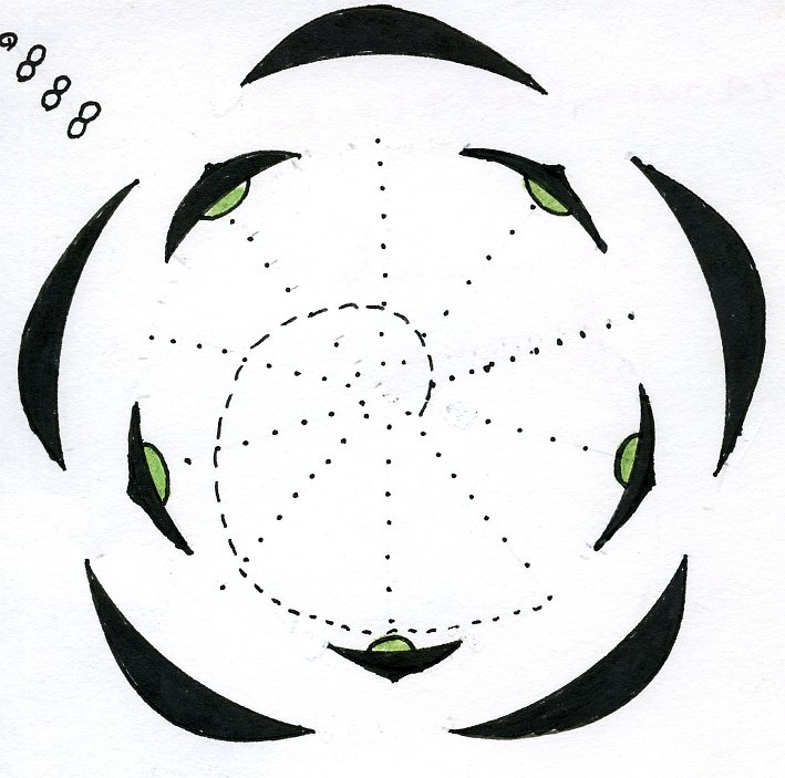 bloemdiagram Ranunculus, Ranunculus floral diagram